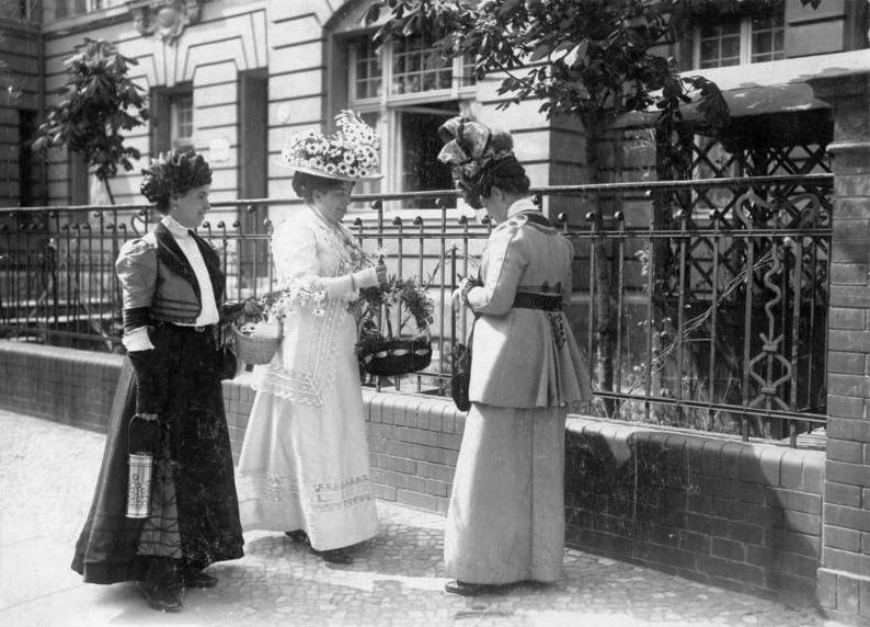 Berlin-Friedenau, Sammlung am Margueritentag ADN-ZB/Archiv Deutschland Margueritentag am 6. Mai 1911 in Friedenau bei Berlin, veranstaltet vom Vaterländischen Frauenverein. Unser Bild zeigt Verkäuferinnen in den Strassen Friedenaus. 7281-11